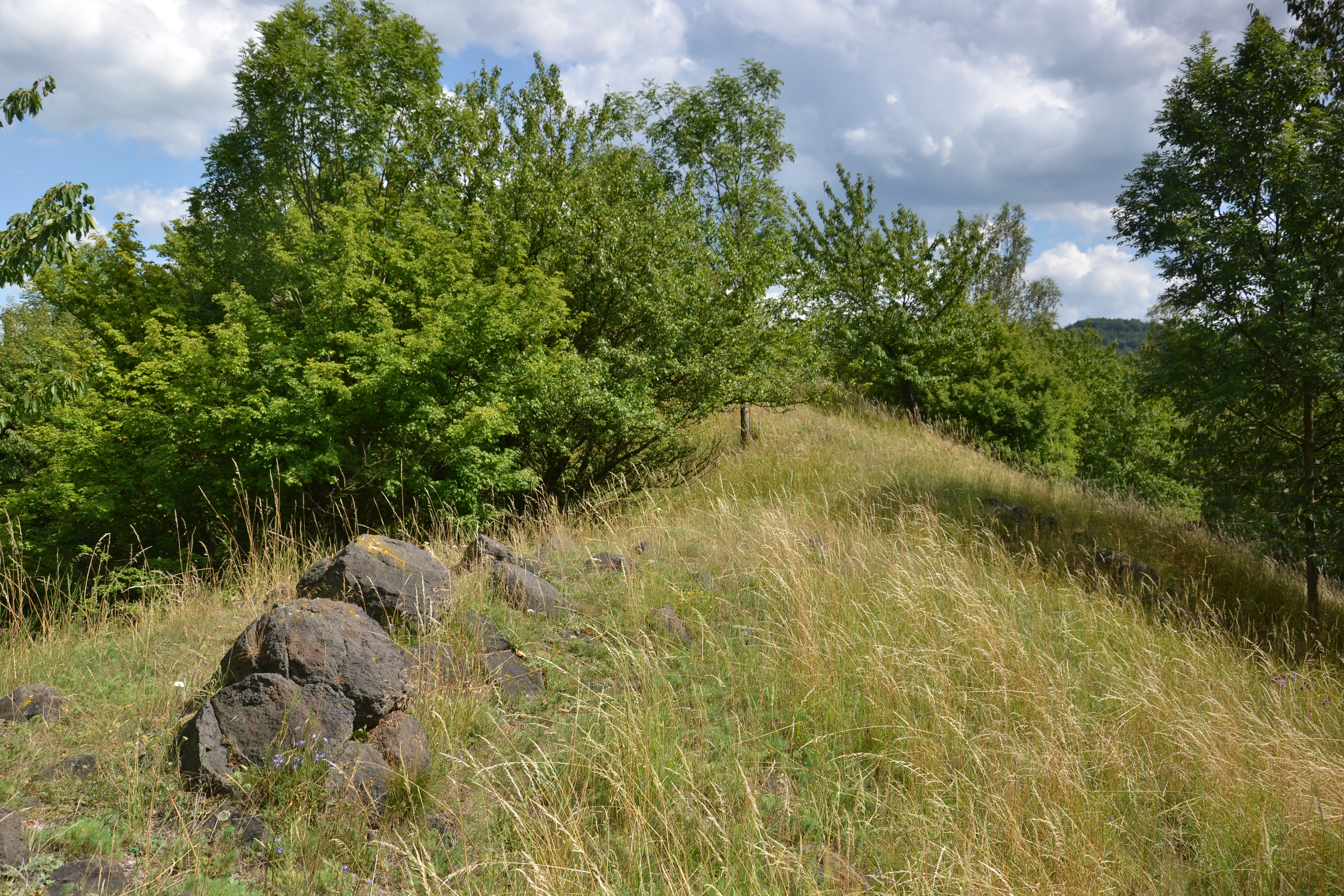 Pastviště u Okounova – skalní výchoz na Holém kopci